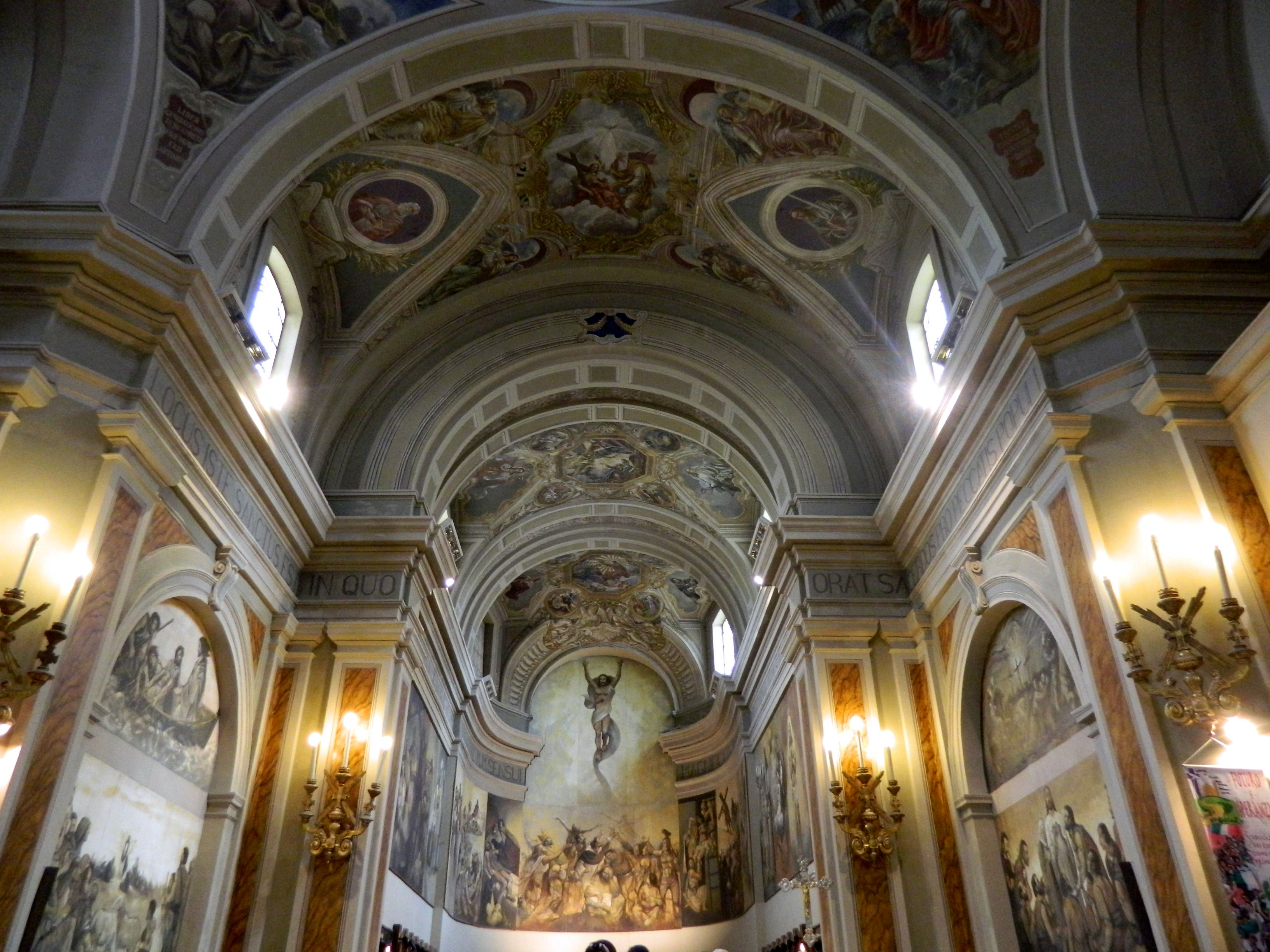 Cattedrale di San Gerardo (Potenza) - Zona absidale